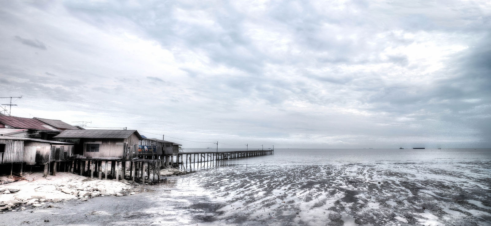 峇株巴辖海口